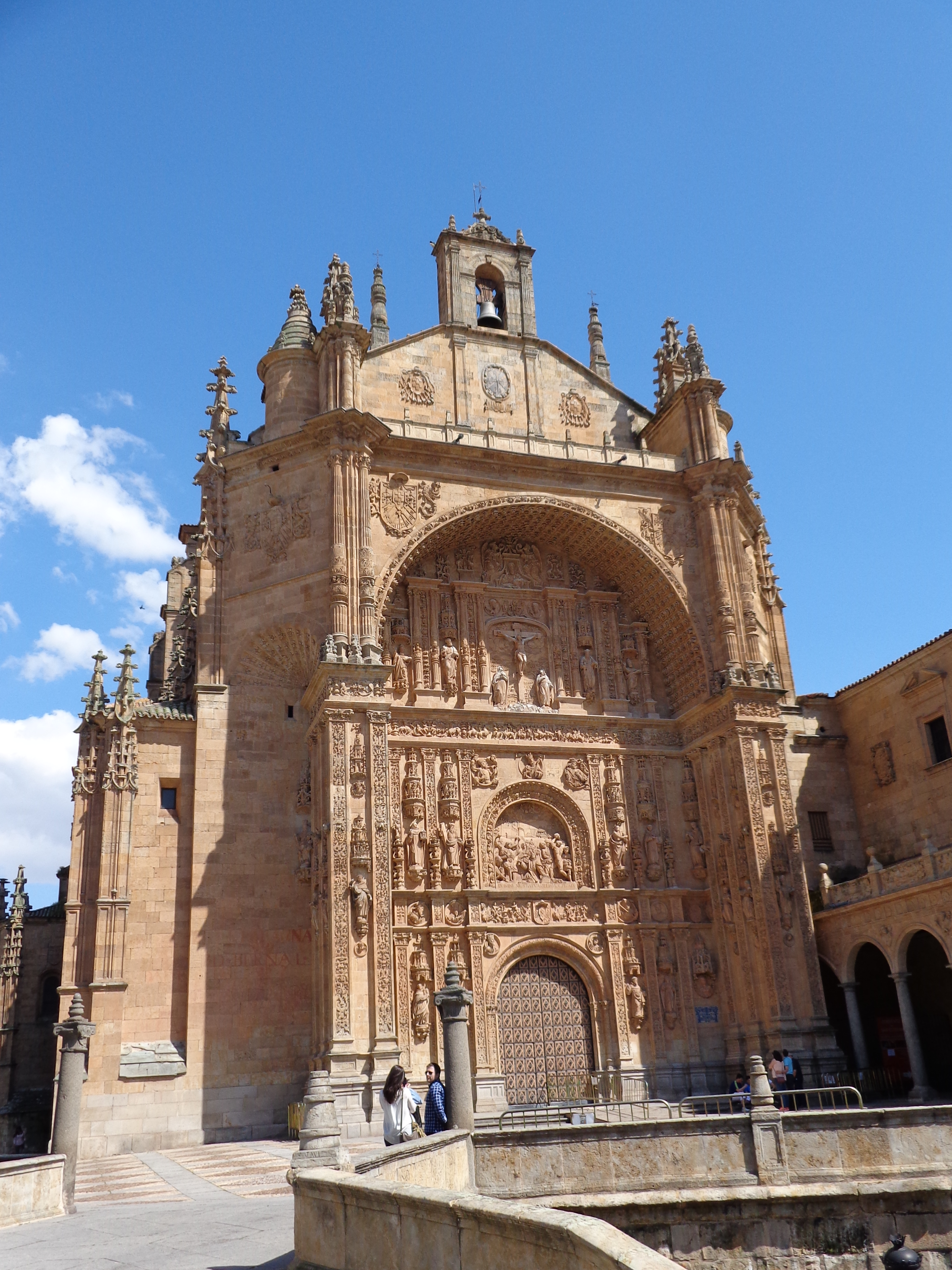 Convento de San Esteban, Salamanca